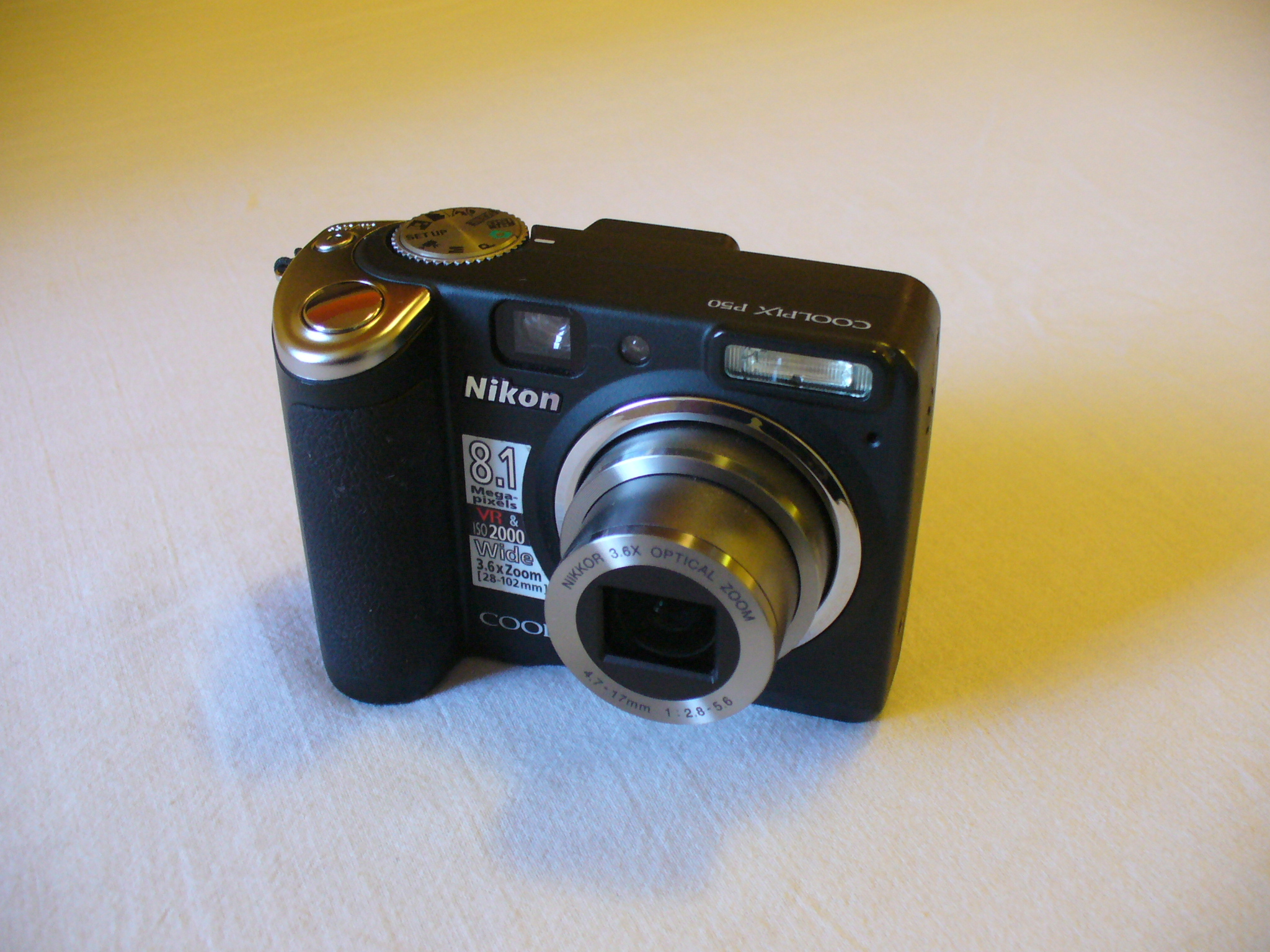 Nikon Coolpix P50